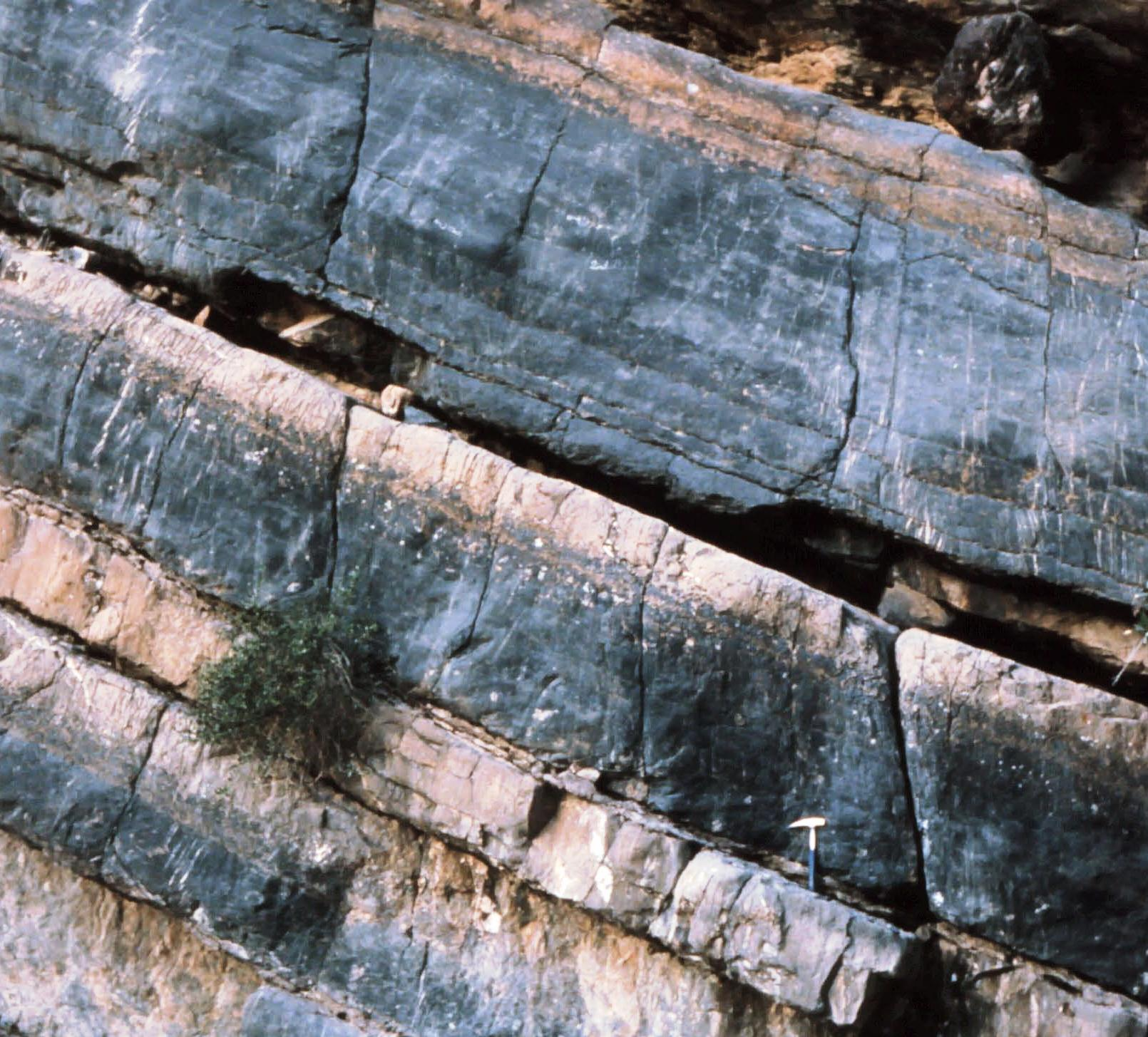 Cycles émersifs métriques de comblement (auto ou allocycliques ?) sur la plate-forme carbonatée jurassique de la chaîne principale des montagnes d'Oman (jbel Laghdar). Le sommet des cycles est dolomitisé (en jaune), formé de tapis algaires en milieu inter à supratidal. De tels cycles sont connus sur tout le pourtour de la Téthys mésozoique. Un cadre biostratigraphique est fourni par les foraminifères au Maroc (Septfontaine, 1984,1985) et en Oman/Abu Dhabi (Septfontaine & De Matos, 1998). Discussion: voir les fig. précédentes.Unknown metric regressive "shallowing upward" cycles in the jurassic platform of arabia, jbel lakhdar range, oman. top of sequences: algal dolomitized laminations in an inter to supratidal environment. such cycles are well known all around the mesozoic téthys. biostratigraphical setting in septfontaine, 1984 and 1985, morocco and in abu dhabi/musandam in septfontaine & de matos, 1998. discussion, see previous figures.